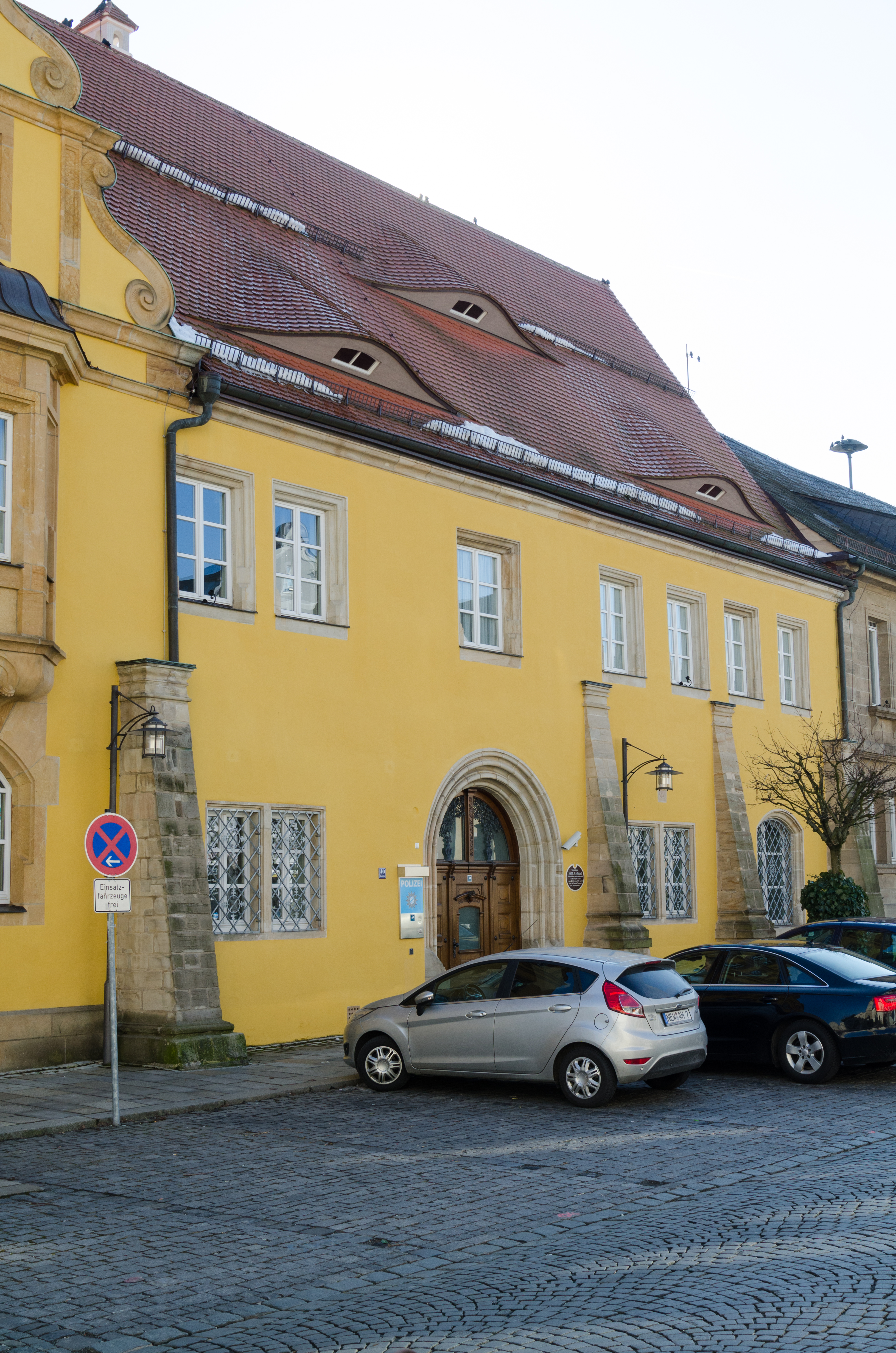 Kemnath, Stadtplatz 40